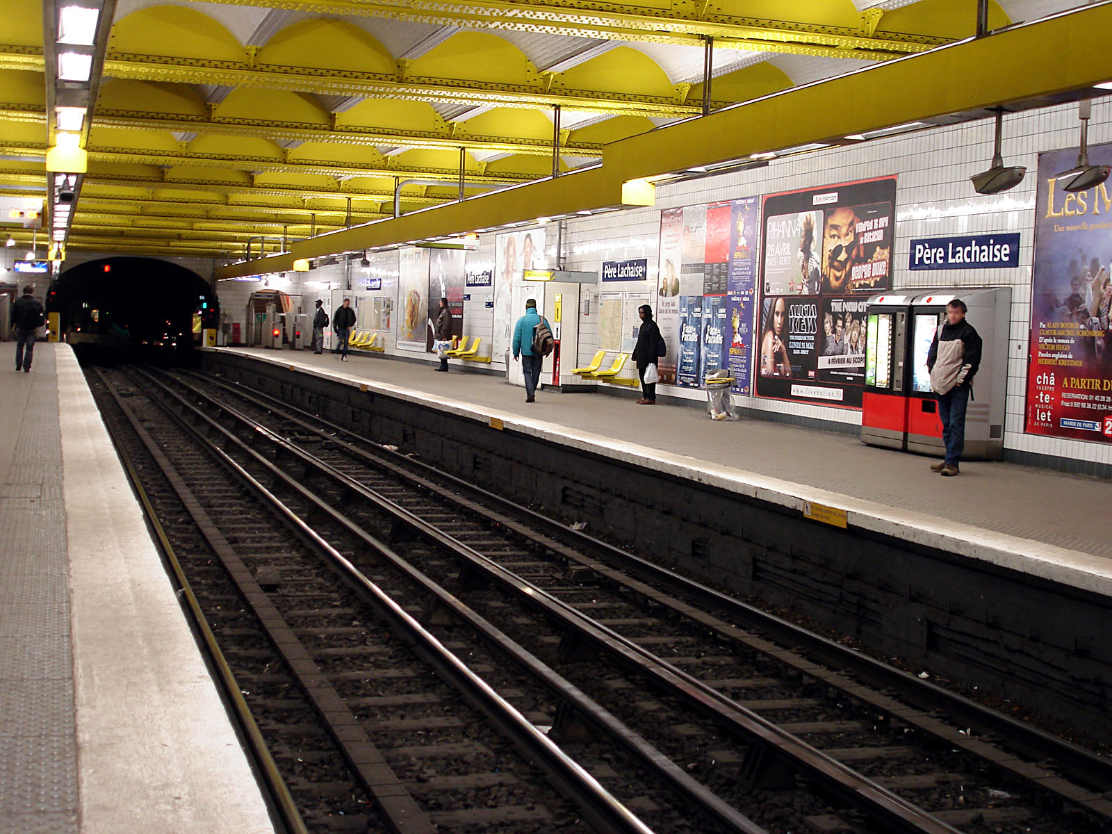 La station Père Lachaise de la ligne 3 du métro de Paris, France.